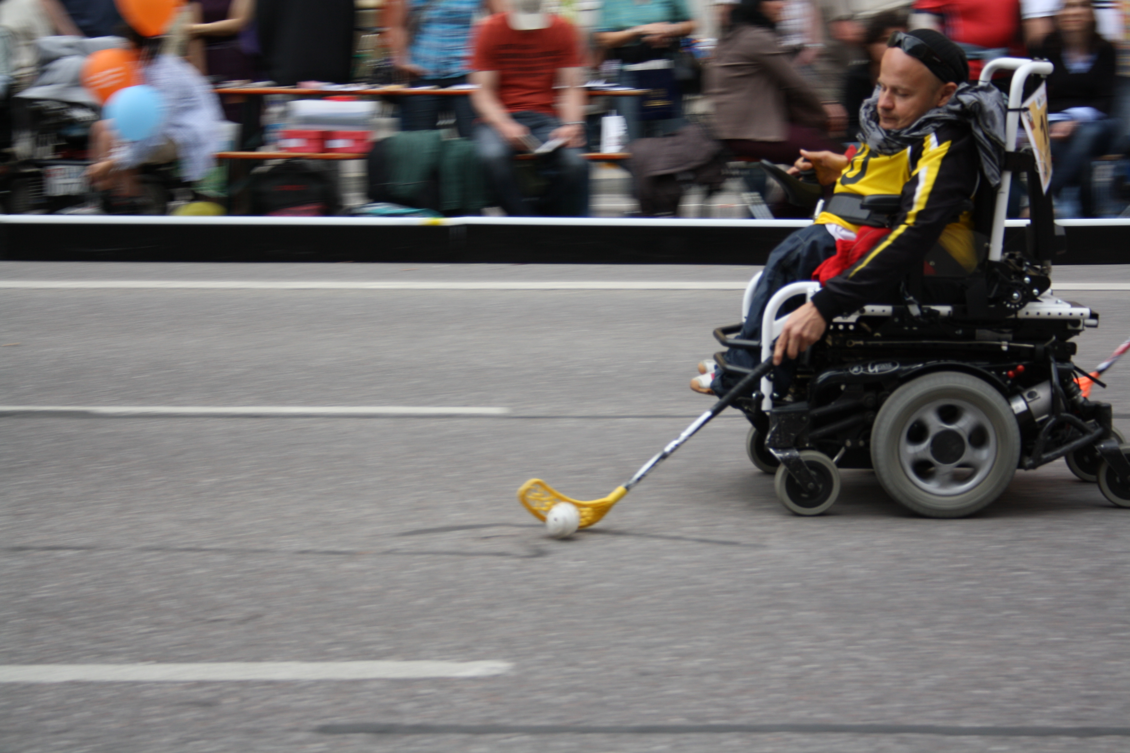 Rollstuhl-Hockey auf dem Streetlife Festival/Corso Leopold